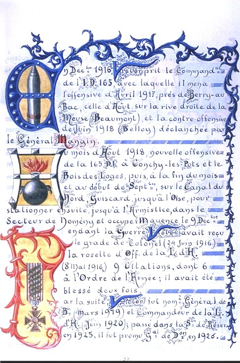 Photographie de la page 37 par le Chevalier Henri Goybet du livre de famille du général de Division Mariano Goybet, son arrière grand père .rédigé de 1898 à 1931 retraçant l'histoire de sa famille. Oeuvre de plus de 200 pages numérotées sur parchemin avec très belles enluminures consultable aux archives de Savoie cote Ij 288. Cette image retrace une partie de la carrière du frère de Mariano Goybet, le général de division Victor Goybet